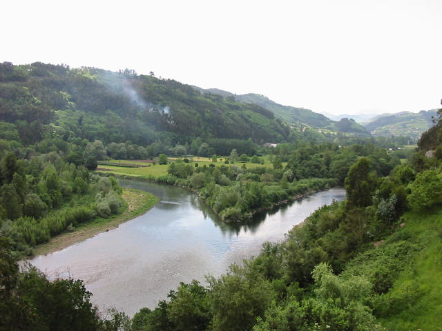 Rio Narcea en su confluencia con el Nalon por